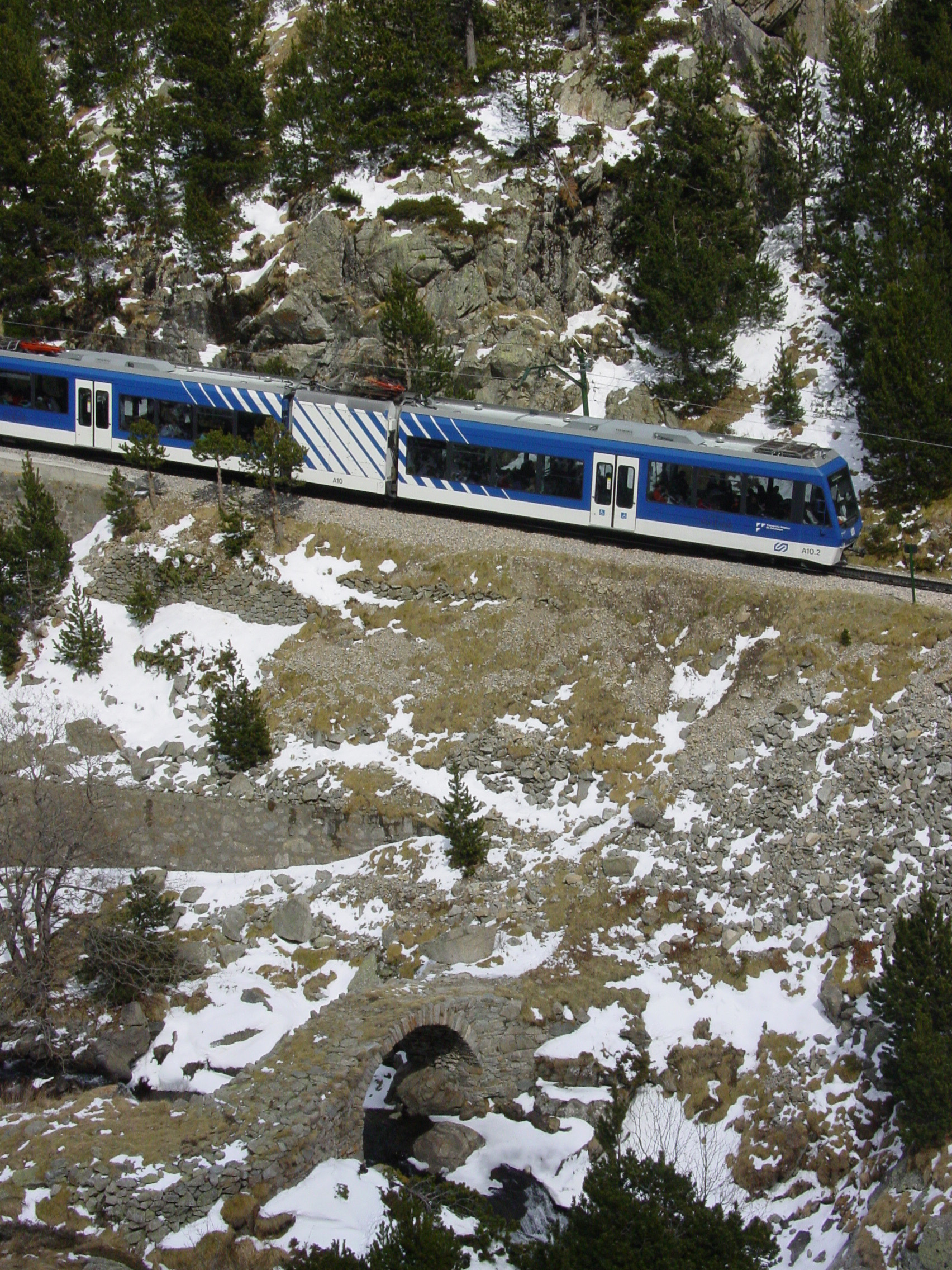 Zahnradbahn im Nuria-Tal